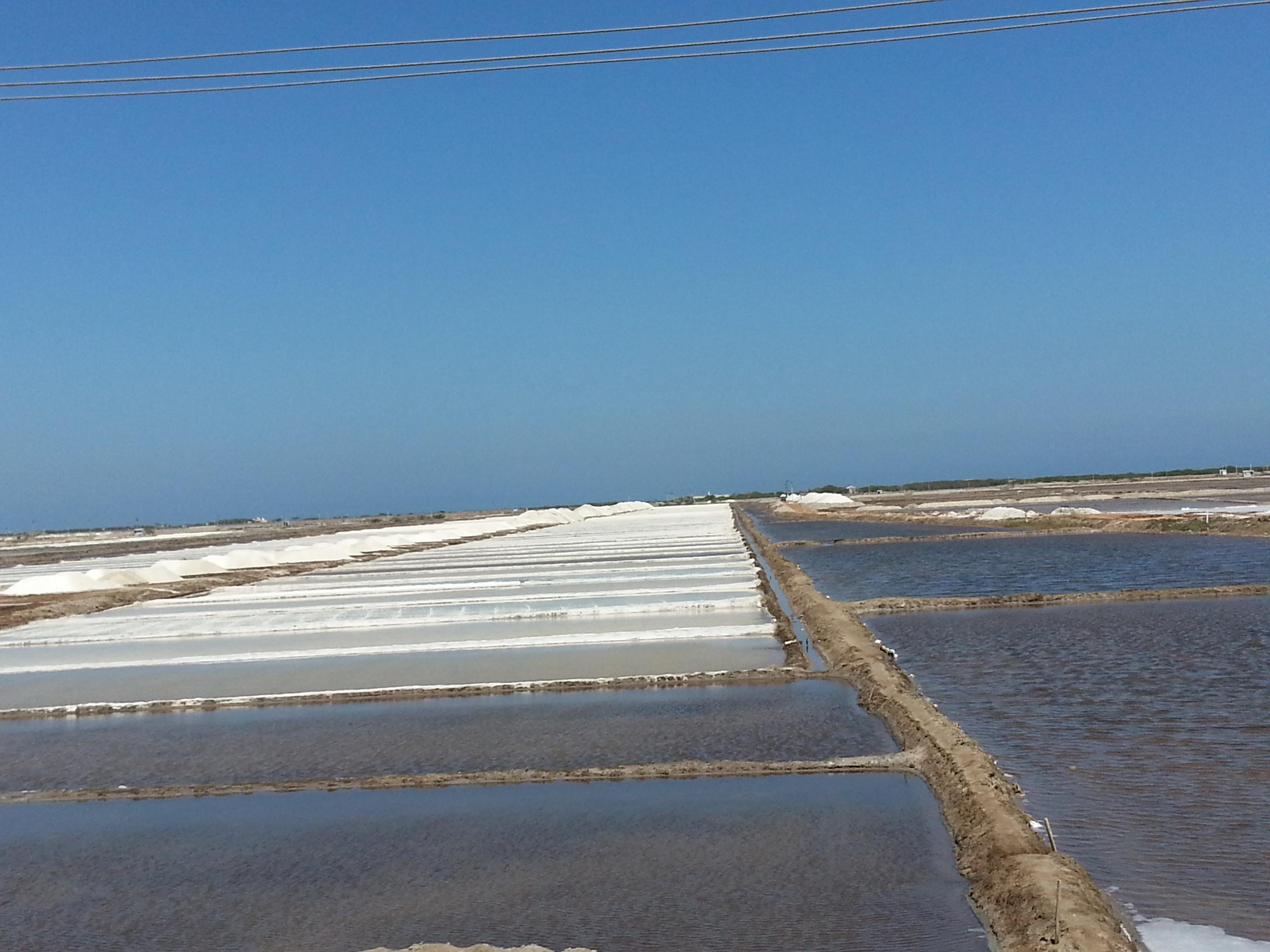 Salterns, salt making fields, tamil nadu